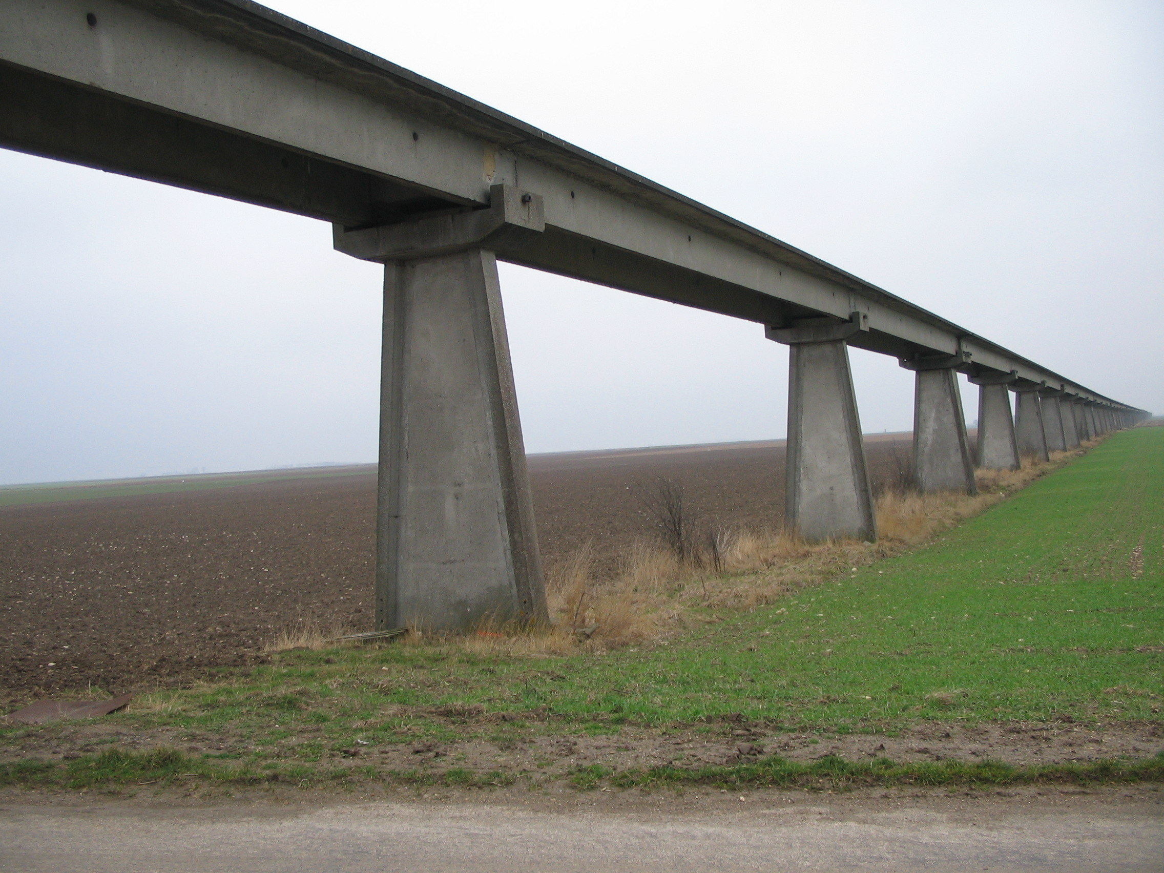 Etat de l'installation vers Artenay (45), printemps 2006.